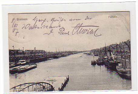 1907 Old images